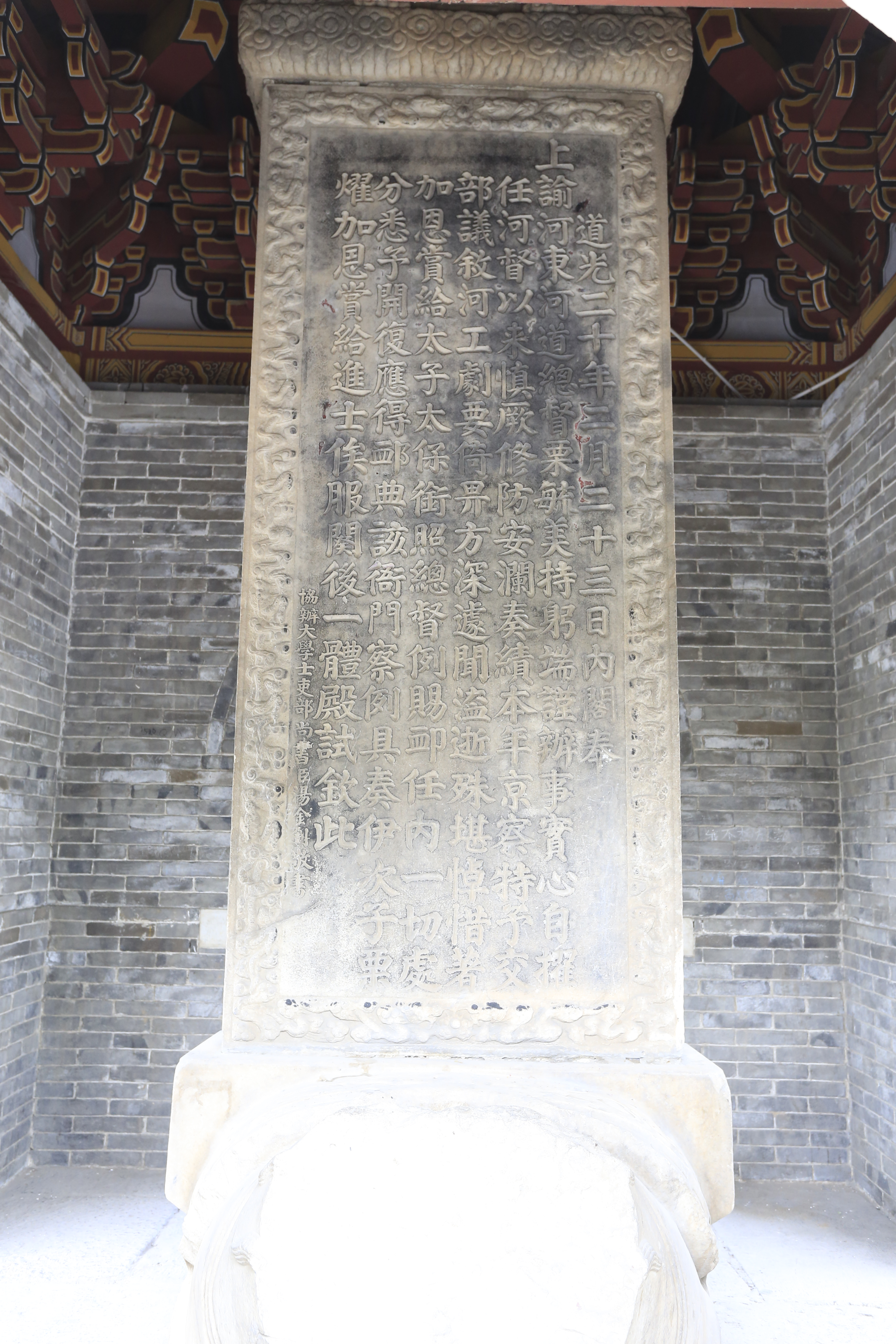 浑源栗毓美墓—— 湯金釗書碑文